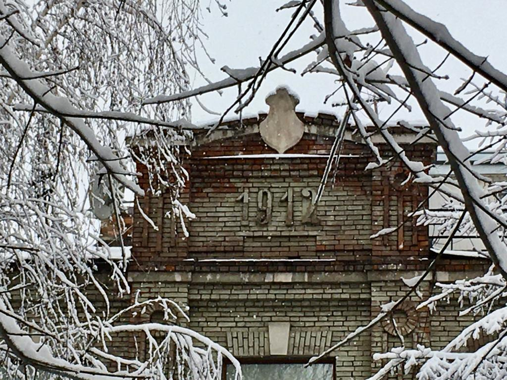 Доходный дом Духиева: улица Тамаева, 21, Владикавказ, Северная Осетия